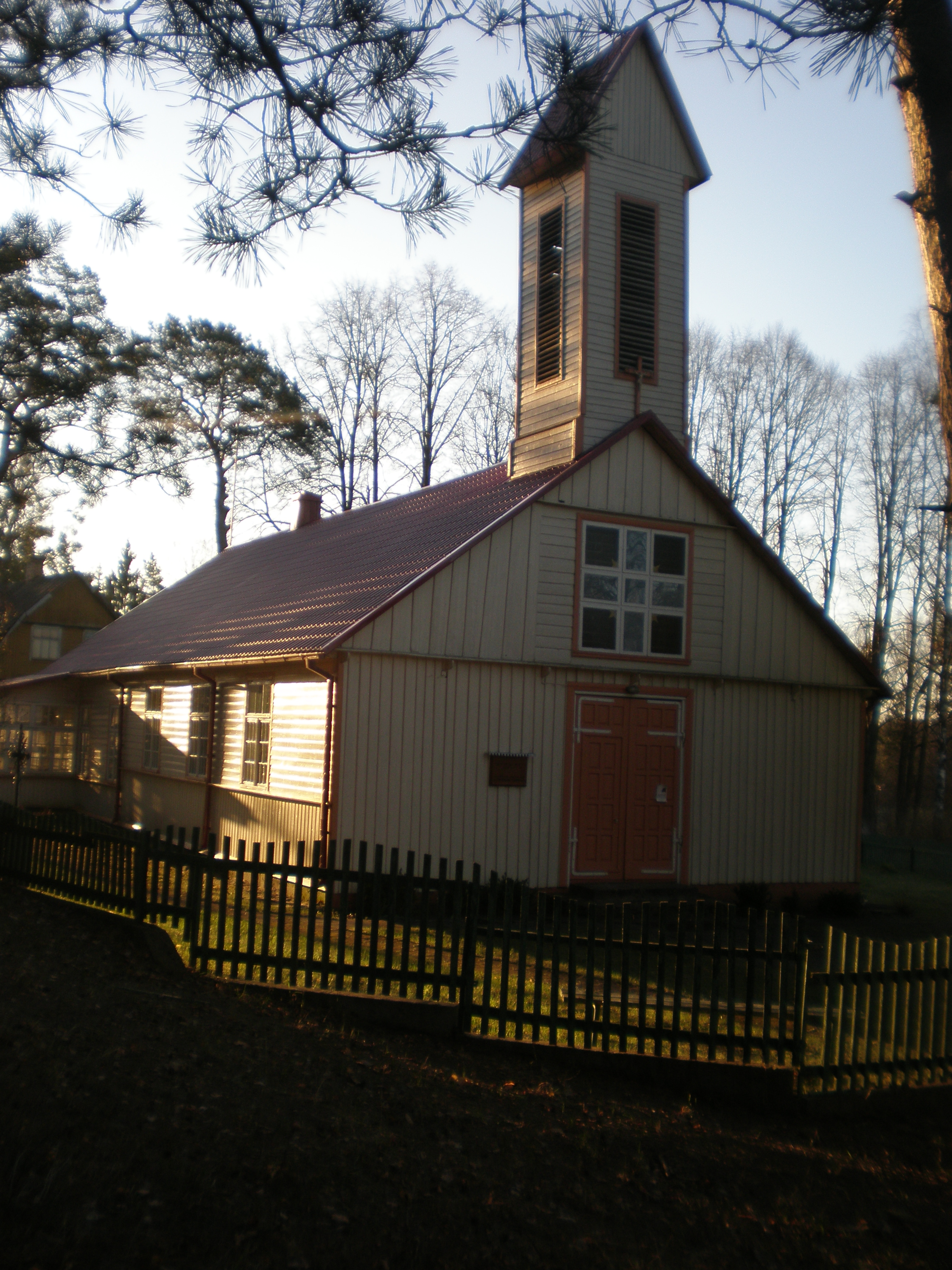 Gerdašių Švč. Mergelės Marijos Nekaltojo Prasidėjimo bažnyčia Gerdašiai kaime